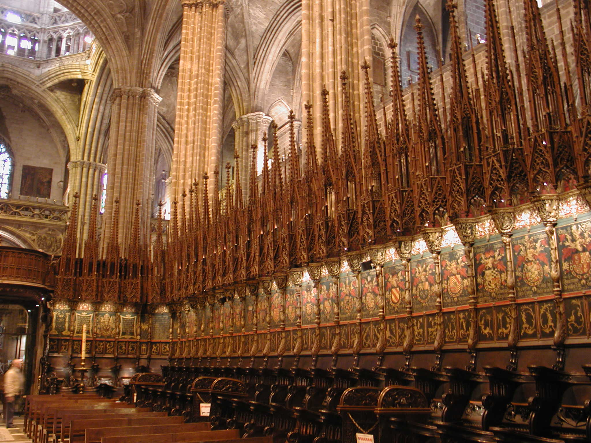 Catedral de Barcelona, Barcelona